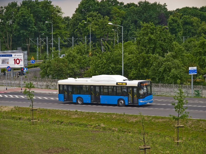 Urbino 12 CNG